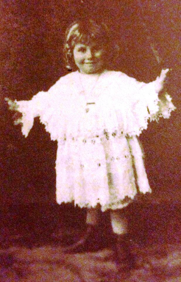 Niní Marshall cerca de los 3 años de edad, c. 1904-06.